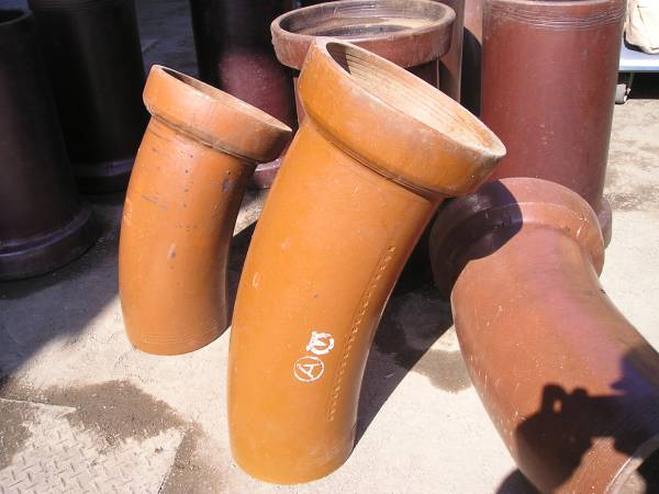 陶管製土管